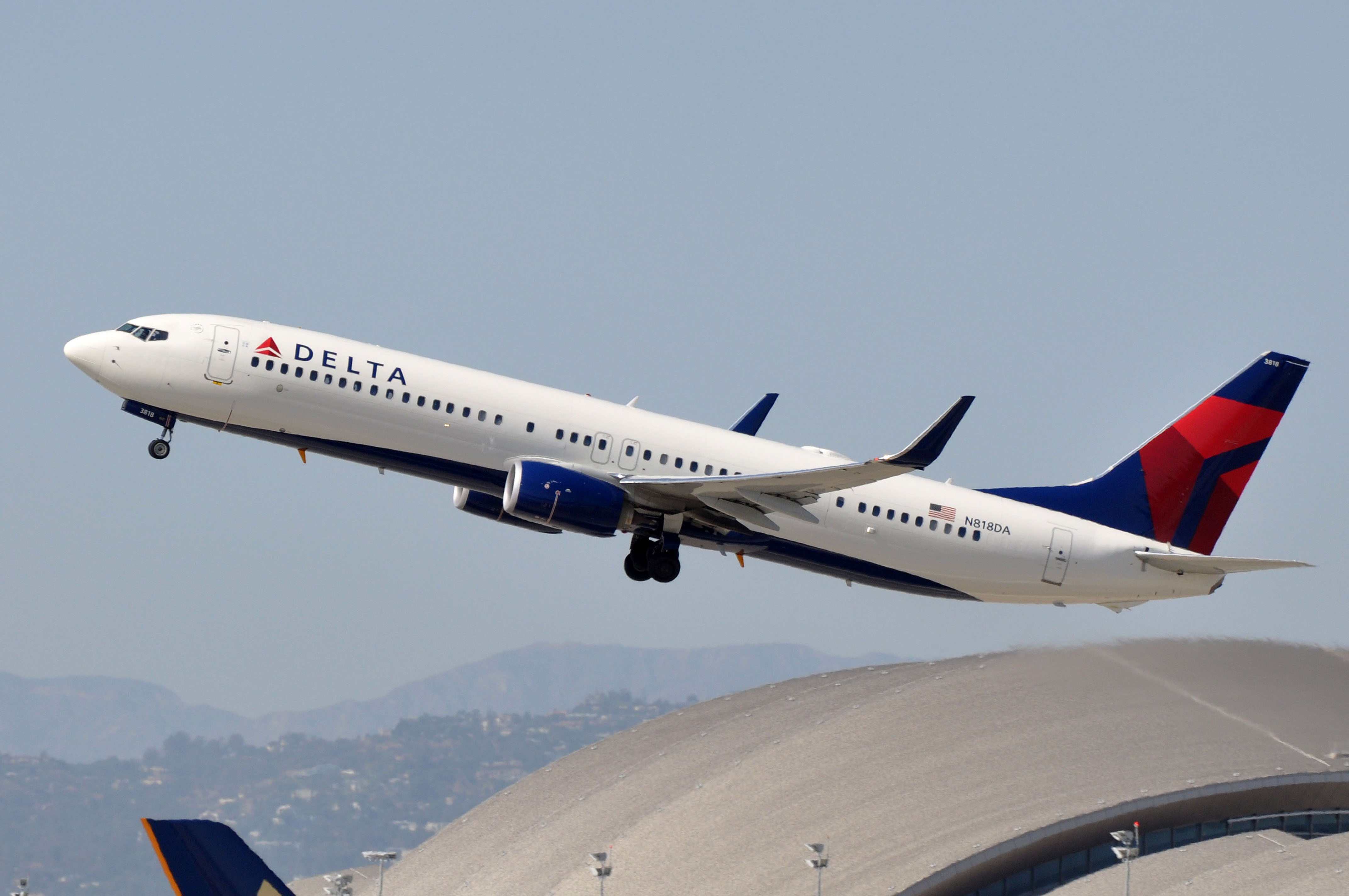 MSN 31928 LN 4829 B737-932ER / 737 / 737-900 / 737-900ER DELTA AIR LINES LAX AIRPORT